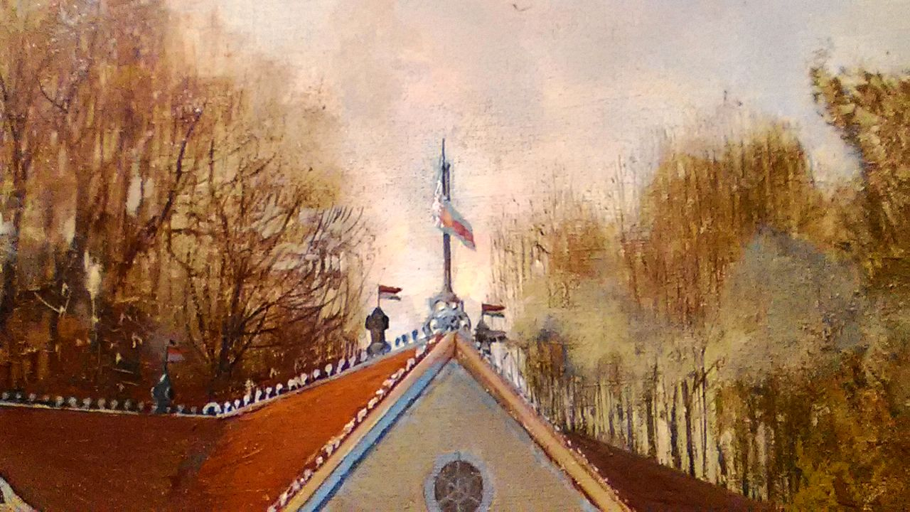 Беларуская (тарашкевіца): «Беларускі пэйзаж. Маёнтак Драчалукі». Фрагмэнт карціны Ю. Клевэра зь бел-чырвона-белым сьцягам.